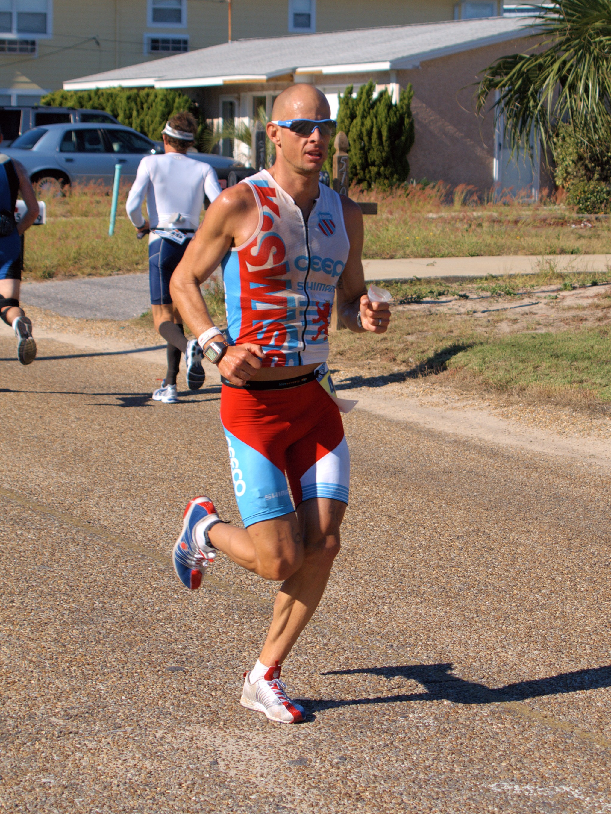 Dirk Bockel, Ironman Florida 2010